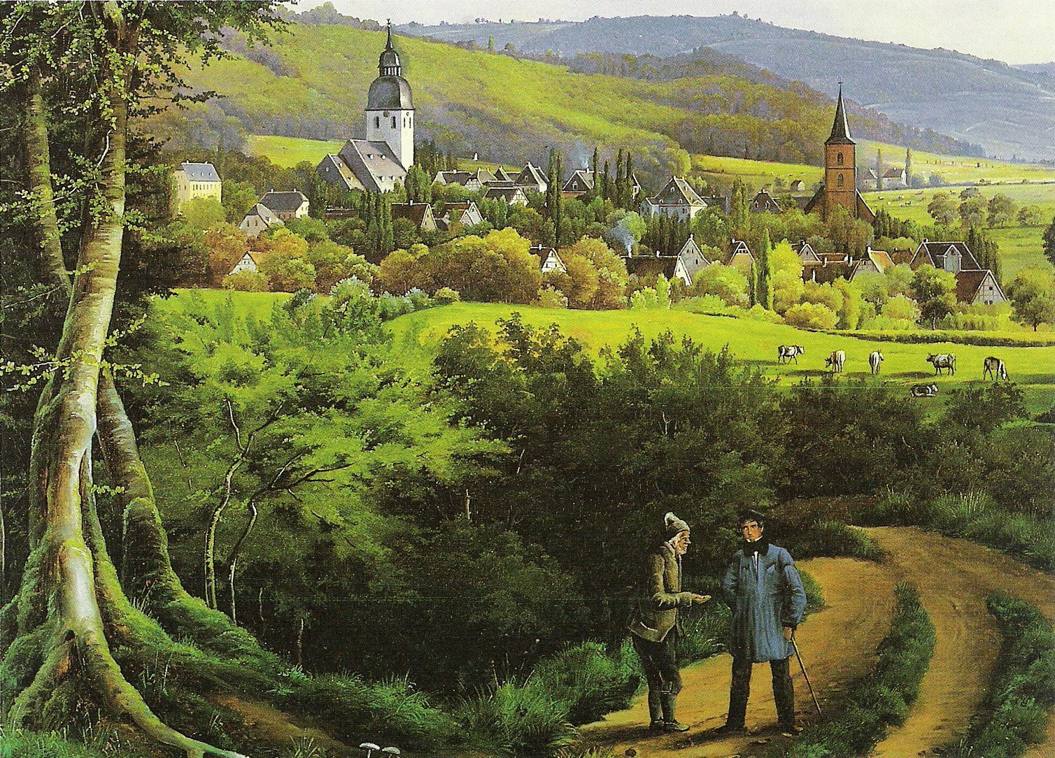 Ansicht der Stadt Schwelm (Ausschnitt eines Ölgemäldes von 1836) – Im Hintergrund sind die lutherische Kirche (links) und die katholische Kirche (rechts) zu sehen.